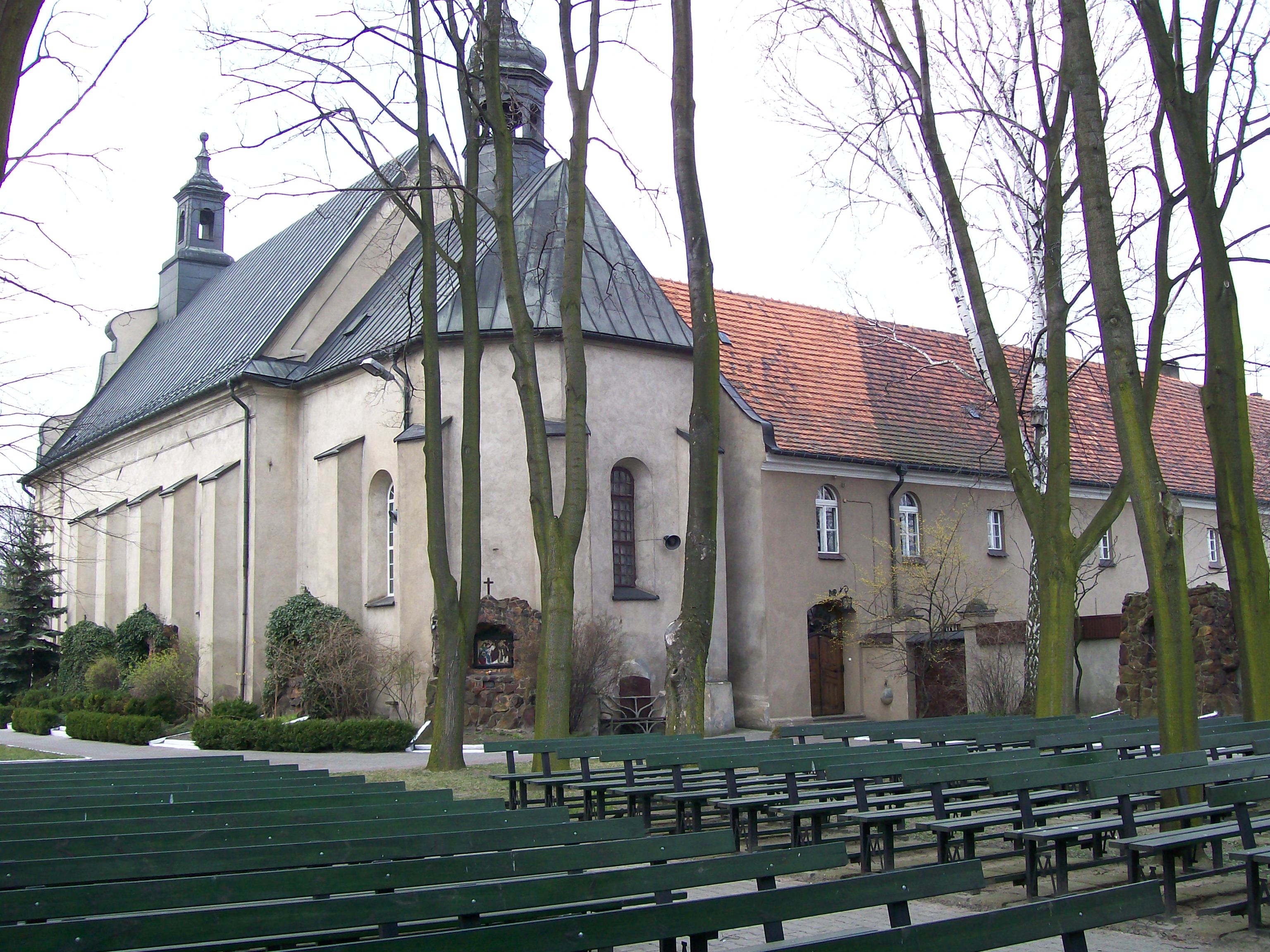 Wieluń - widok na kościół p.w. Zwiastowania NMP, w zespole klasztornym reformatów.